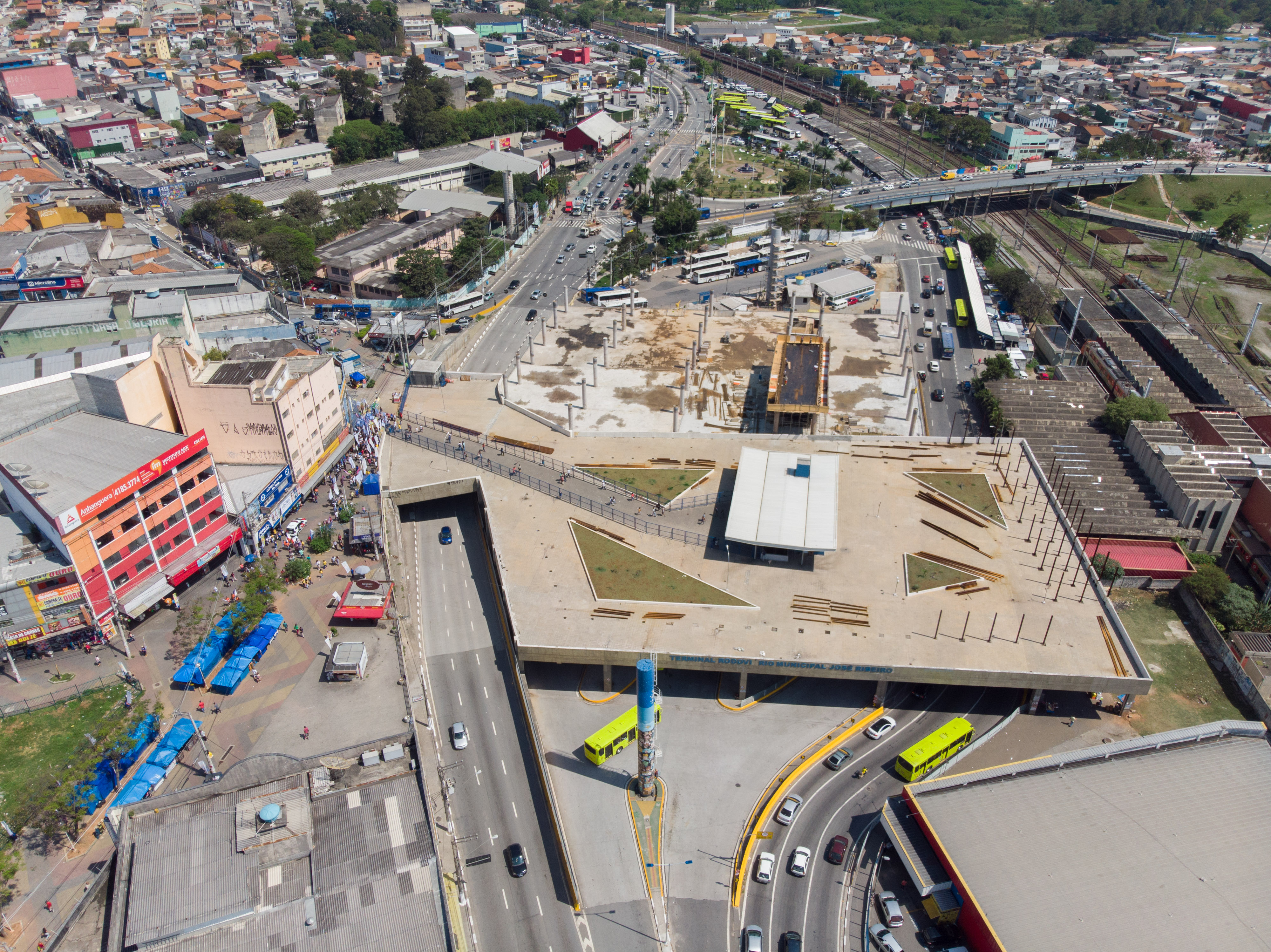 O governador Márcio França, realiza visita técnica às Obras do Terminal Rodoviário de Carapicuíba.Local: São Paulo/SP.Data: 03/10/2018 Foto: Governado do Estado de São Paulo